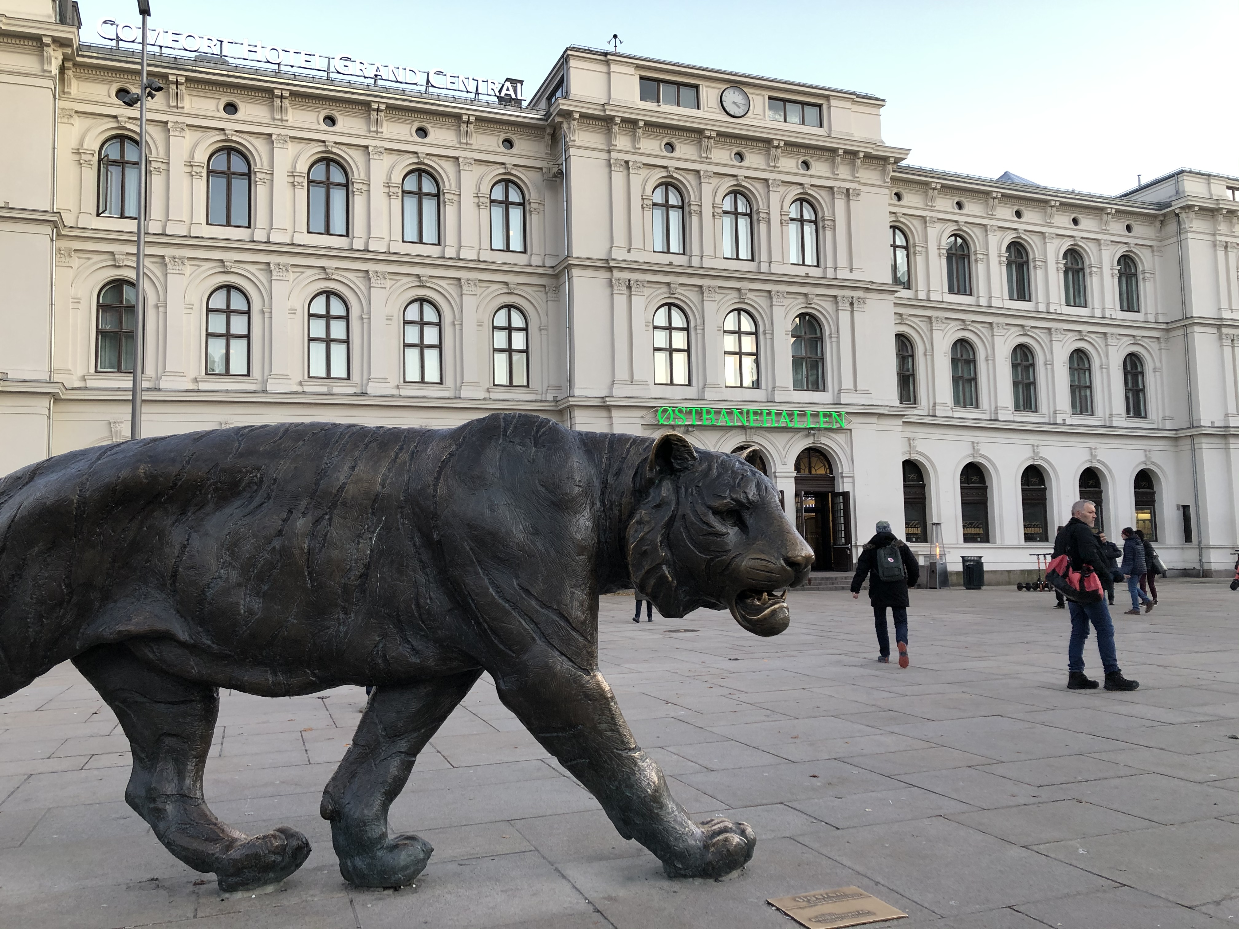 Østbanehallen med tiger foran, Oslo